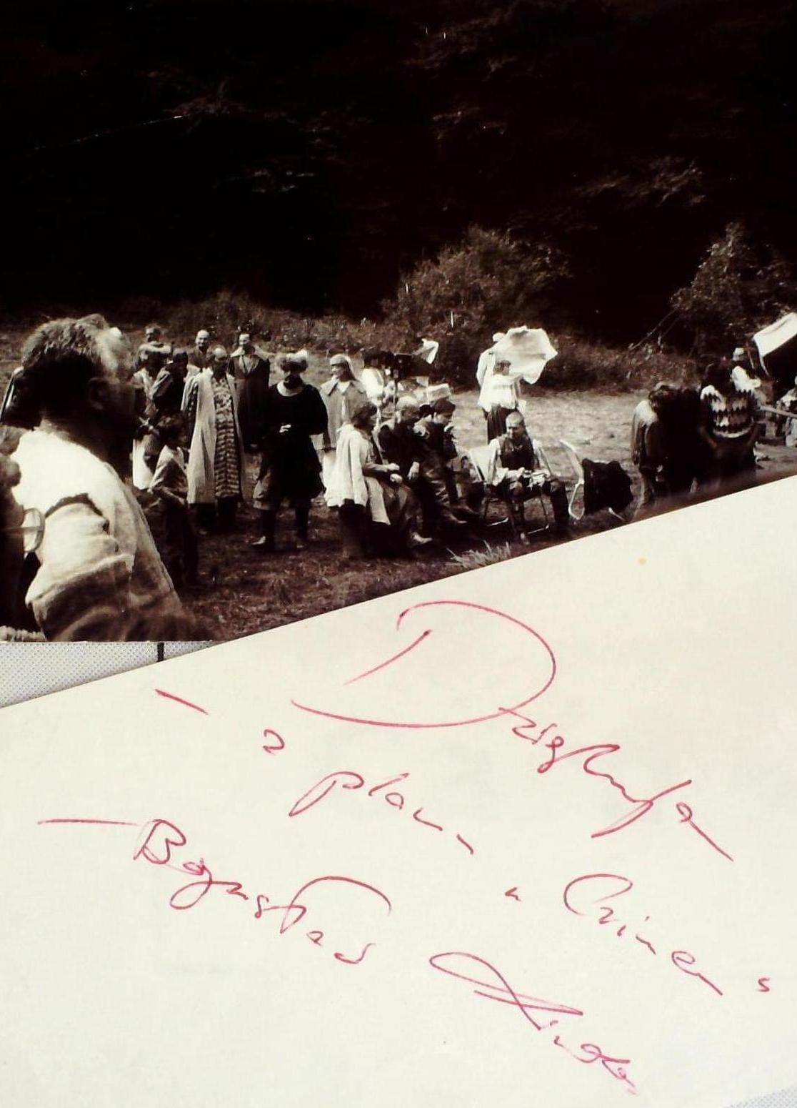 Autogramm von Boguslaw Linda